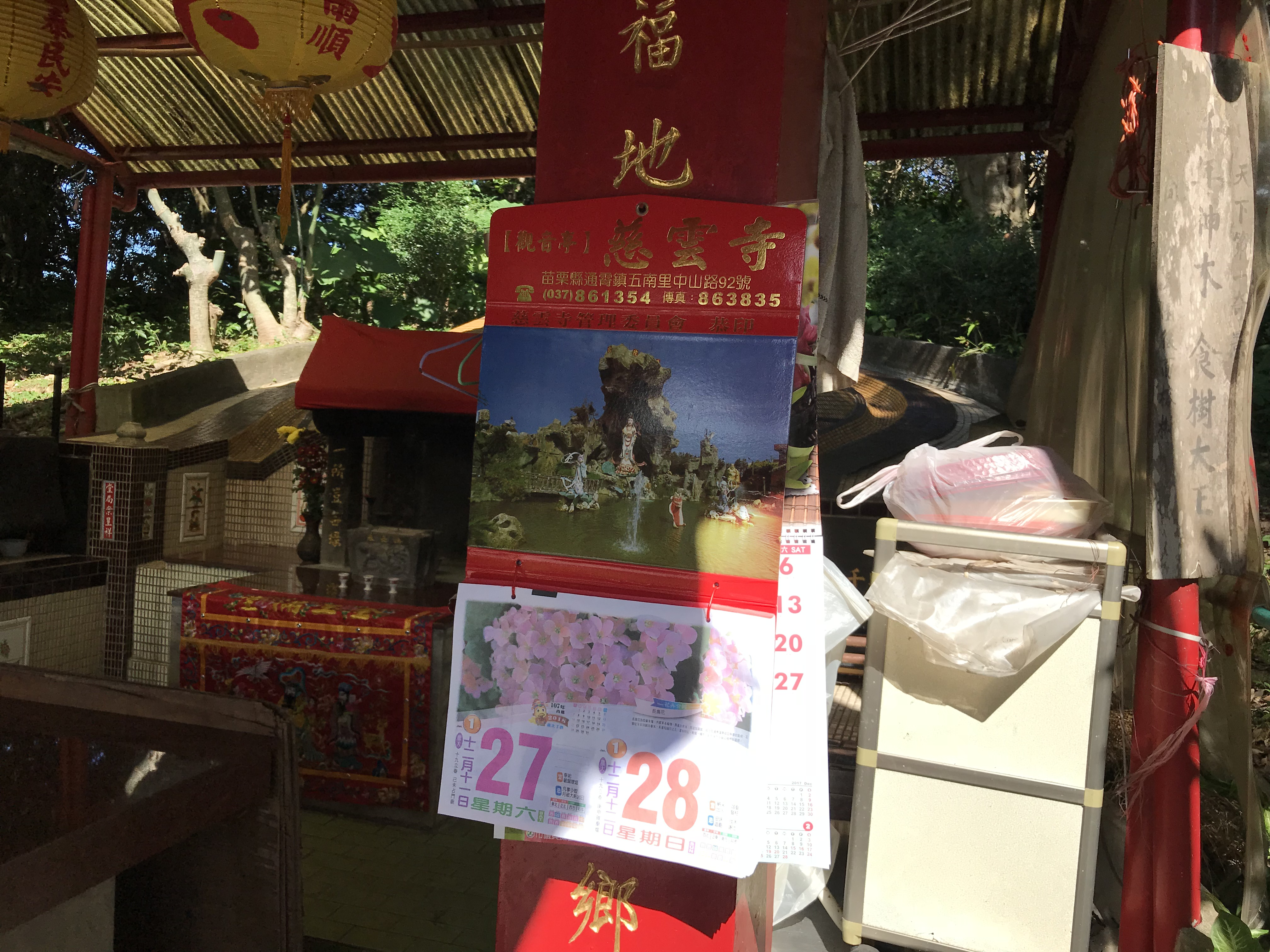 芝山岩同歸所的觀音亭雙日曆